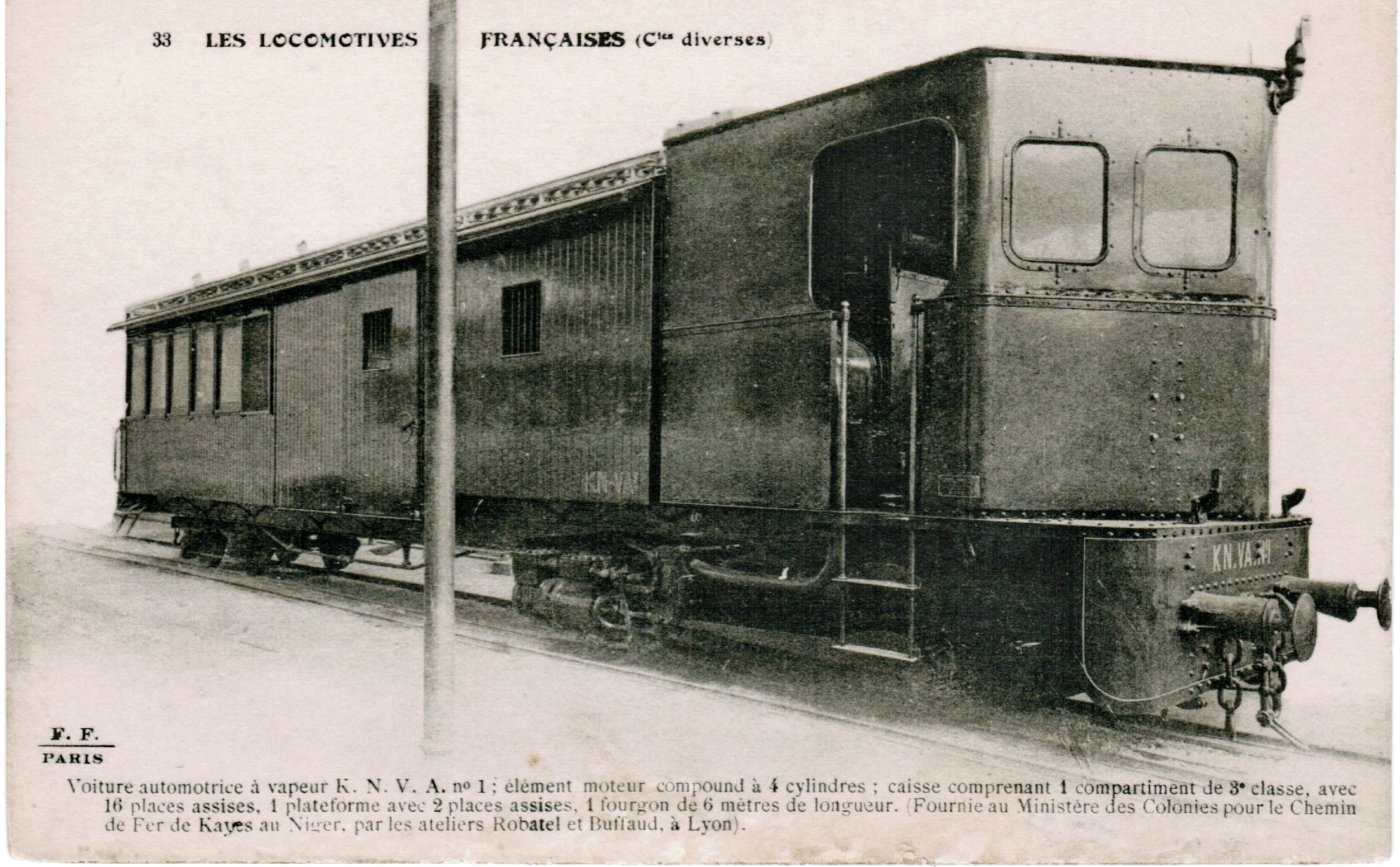 Carte postale ancienne éditée par F. Fleury, collection "Les locomotives françaises (Compagnies diverses)", n°33Voiture automotrice à vapeur du KNVA n°1 (Chemin de fer de Kayes au Niger)